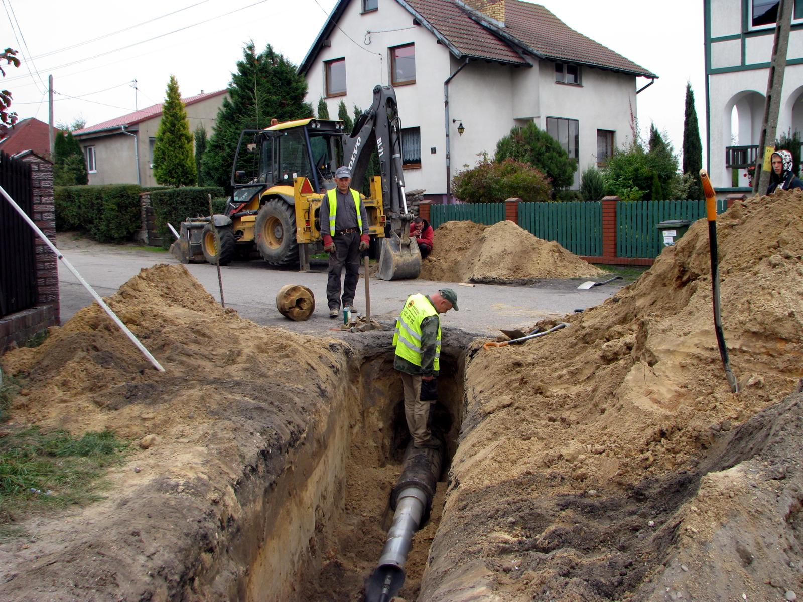 Wojcieszyce. Budowa kanalizacji (2014)